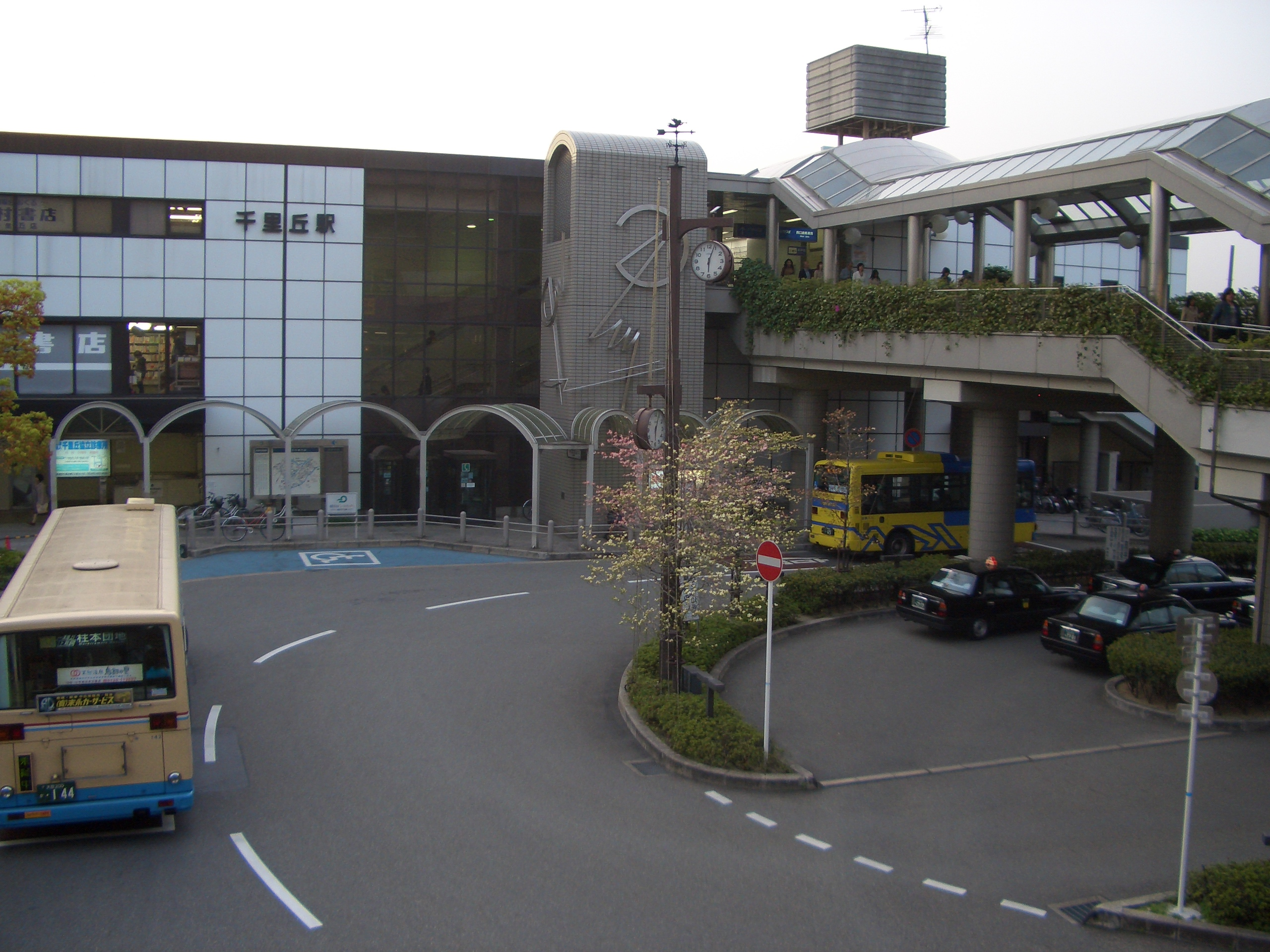 千里丘駅。Sennrioka Station。